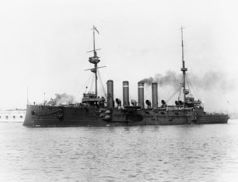 HMS ARGONAUT